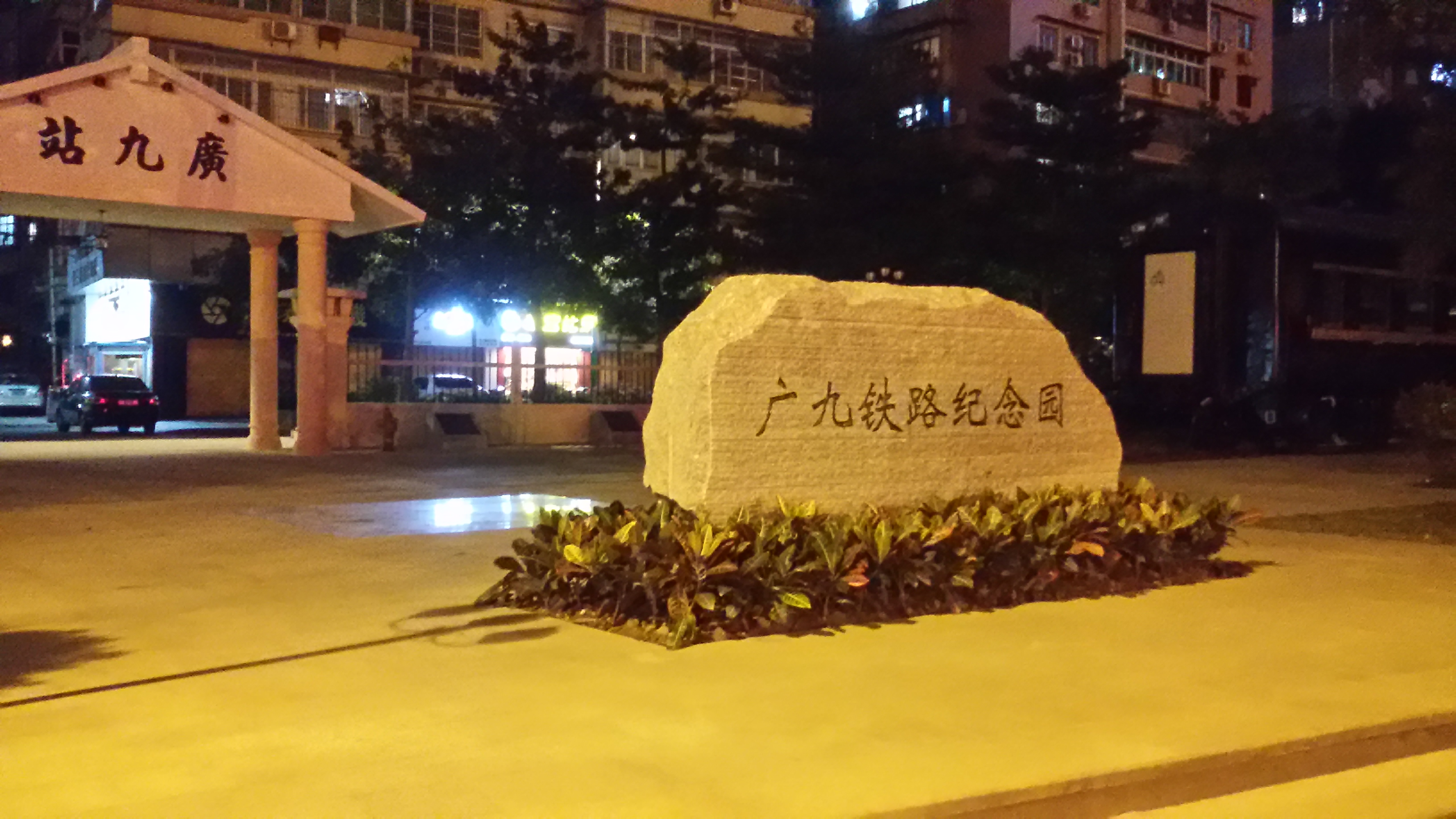 粵語: 廣九鐵路紀念園西邊嚿大石